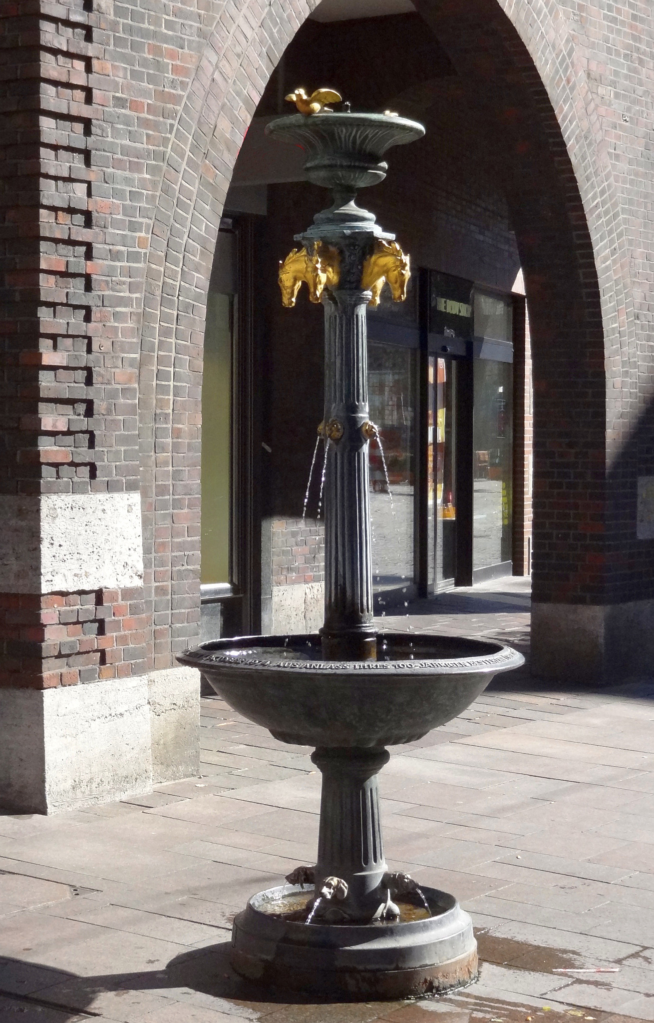 Tierbunnen oder Pferdebrunnen vor dem ehem. Geschäft der Fa. Brinkmann & Lange in der Obernstrasse